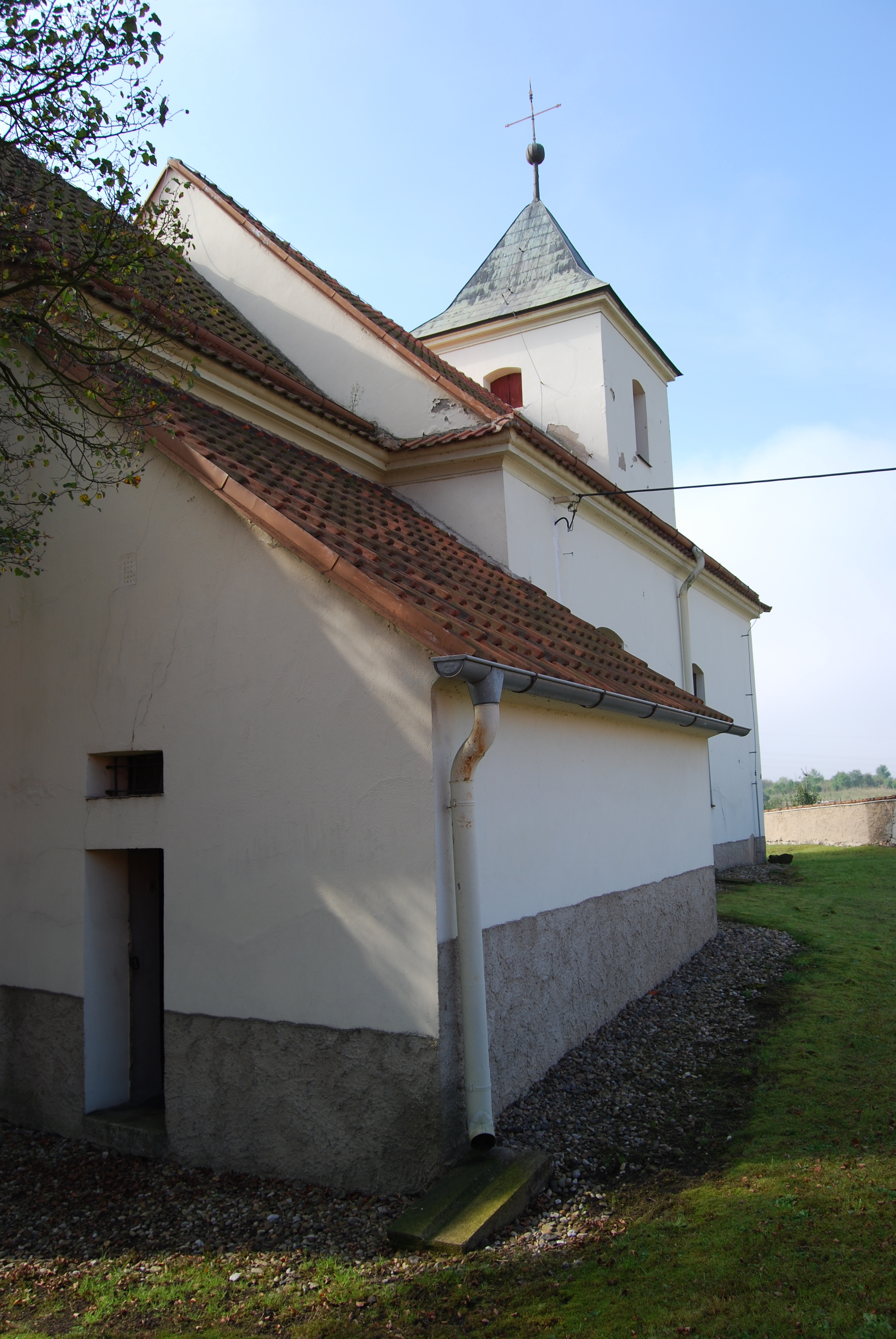 Kostel svatého Václava, Brozánky (Řehlovice)